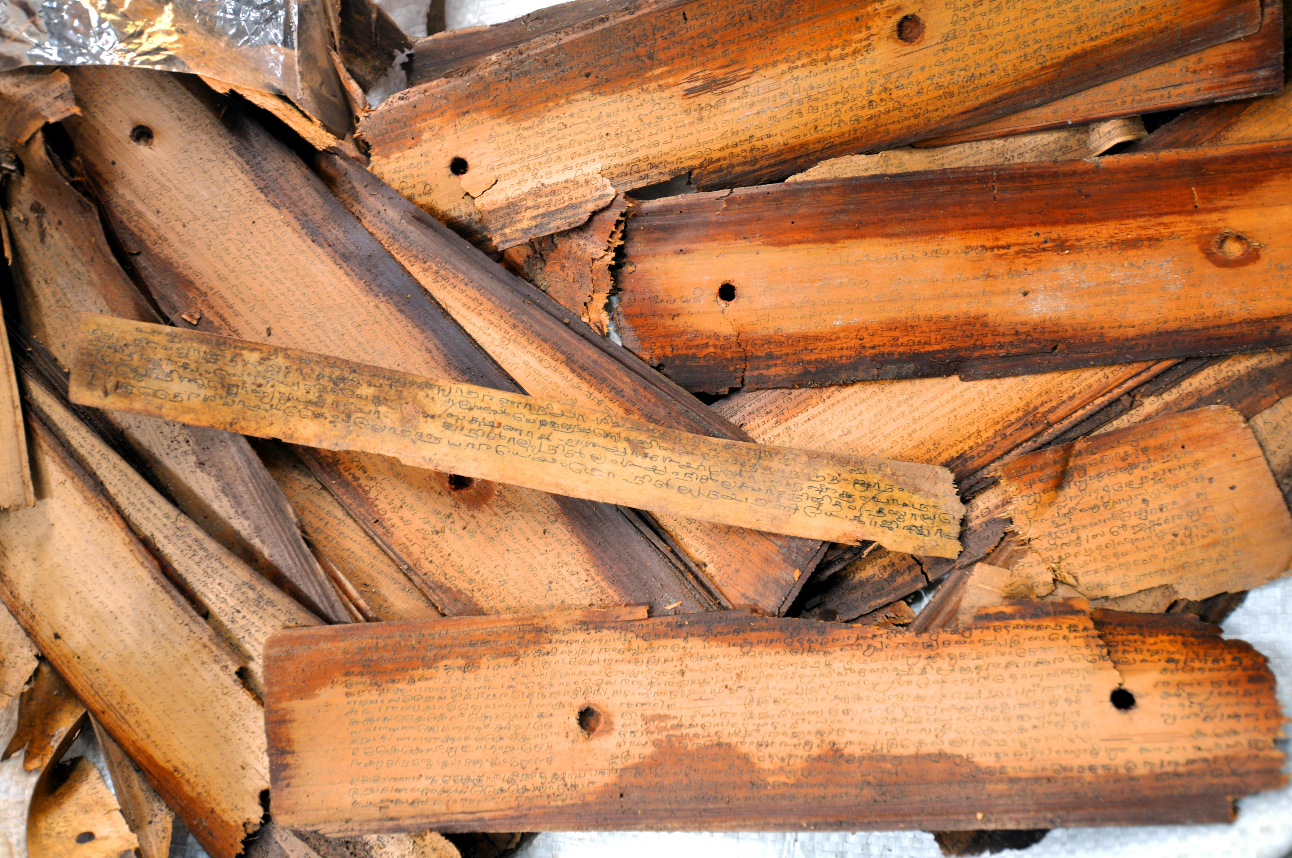 தமிழ் ஓலைச்சுவடிகள்